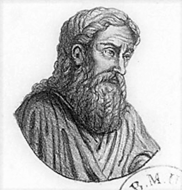 Portrait de Sidoine Apollinaire. Source : Base de données Overnia ; côte : BOYER 2349. (Bibliothèque du Patrimoine de Clermont Auvergne Métropole).